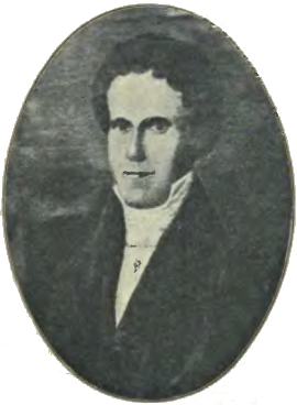 Teaterdirektør Johan Peter Strömberg